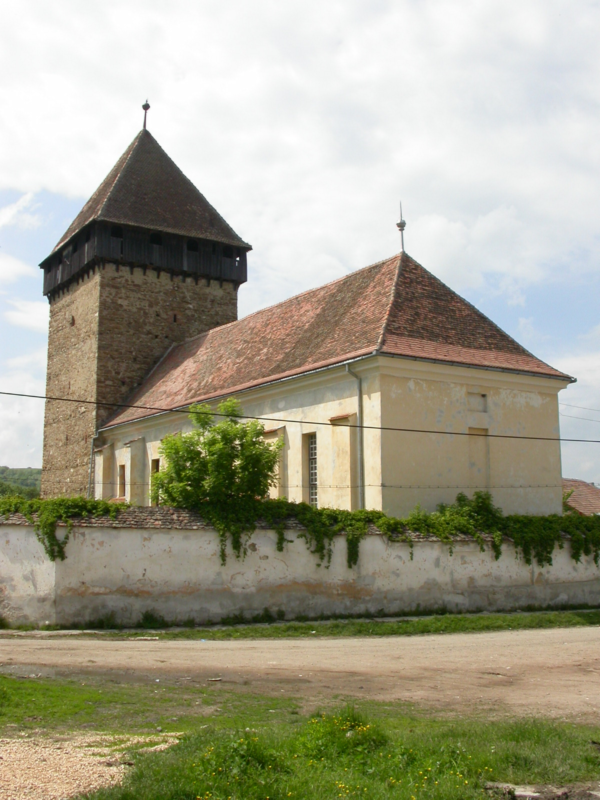 Ansamblul bisericii evanghelice fortificate, sec. XV - XIX